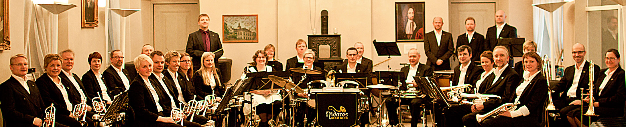 Nidaros Brass Band, fullt band i Trondheim Folkebibliotek, rådssalen. Mars 2011.